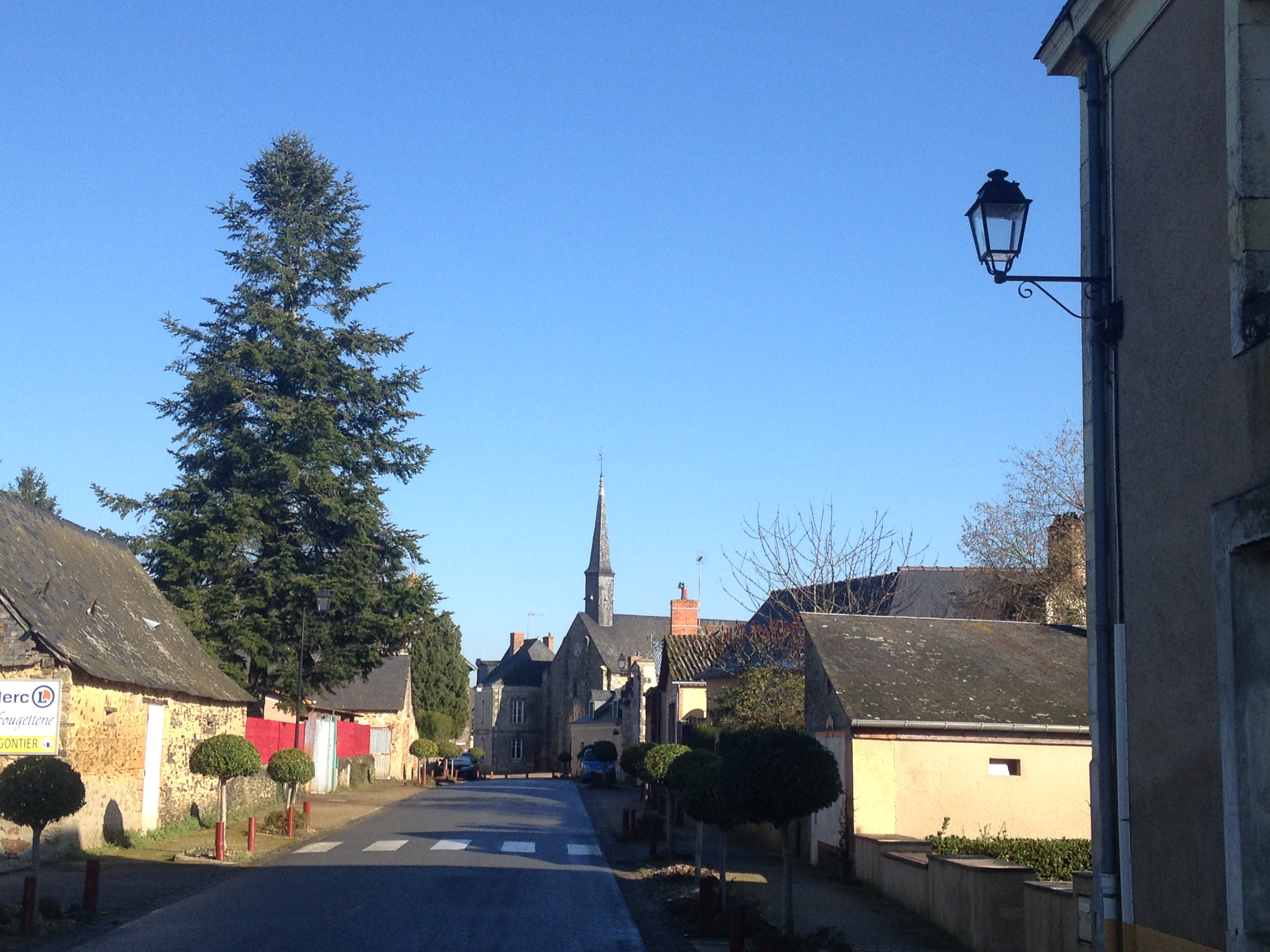 Entrée du village de Mée (Mayenne) par la route de Saint-Quentin-les-Anges